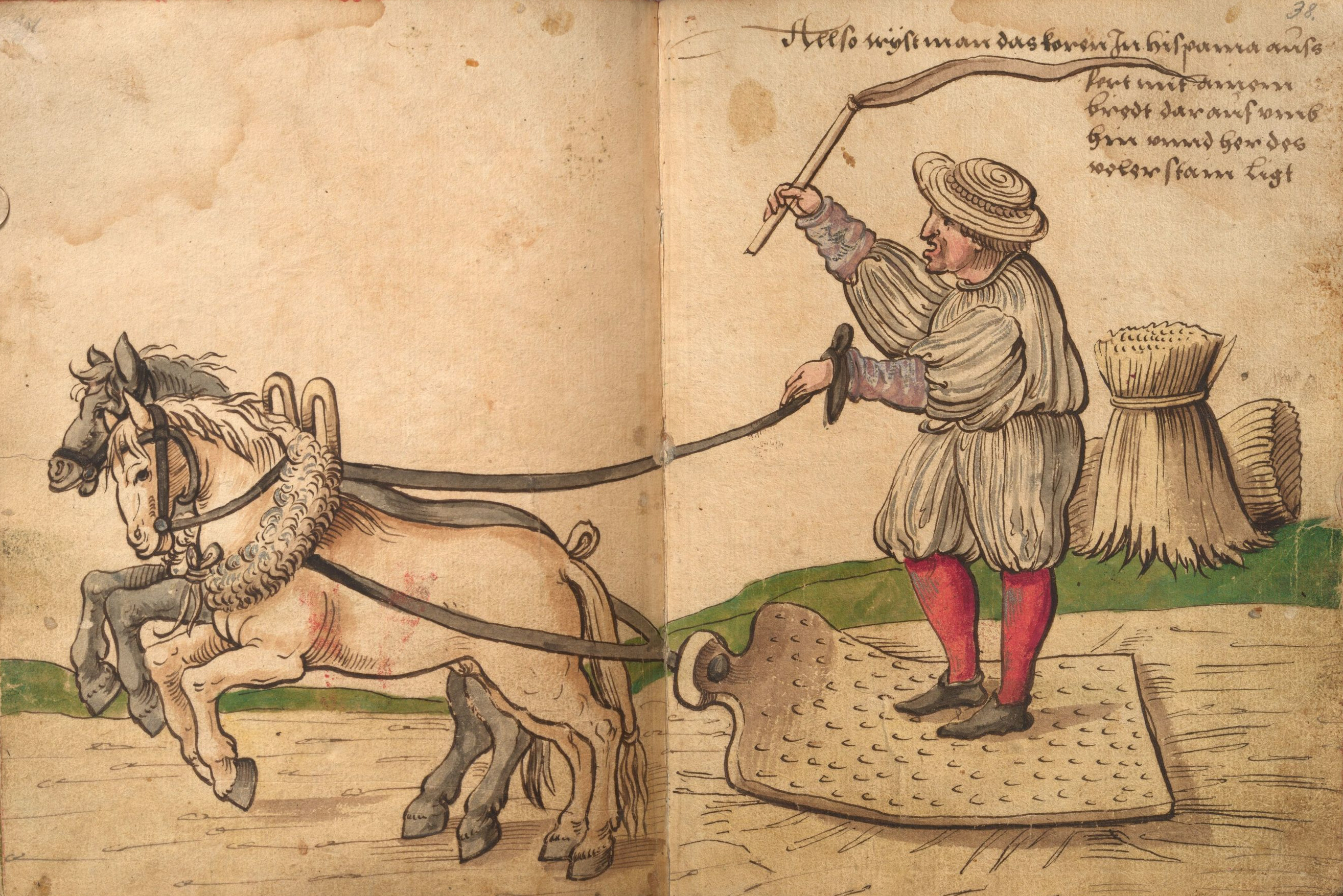 "Trachtenbuch" des Christoph Weiditz, Germanisches Nationalmuseum Nürnberg, Hs. 22474. Bl. 37–38 Wie in Spanien das Korn gedroschen wird